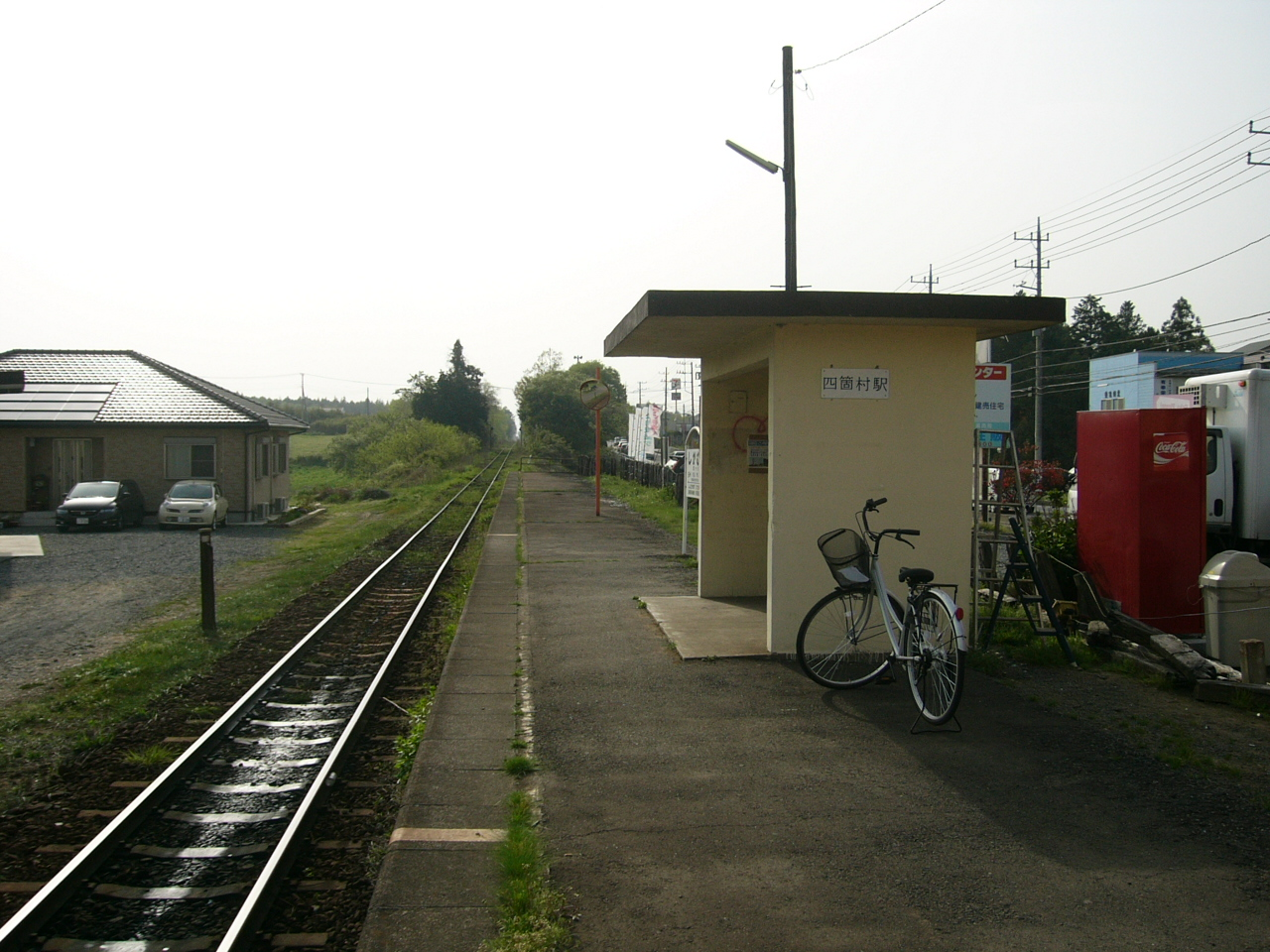 Shikamura Station